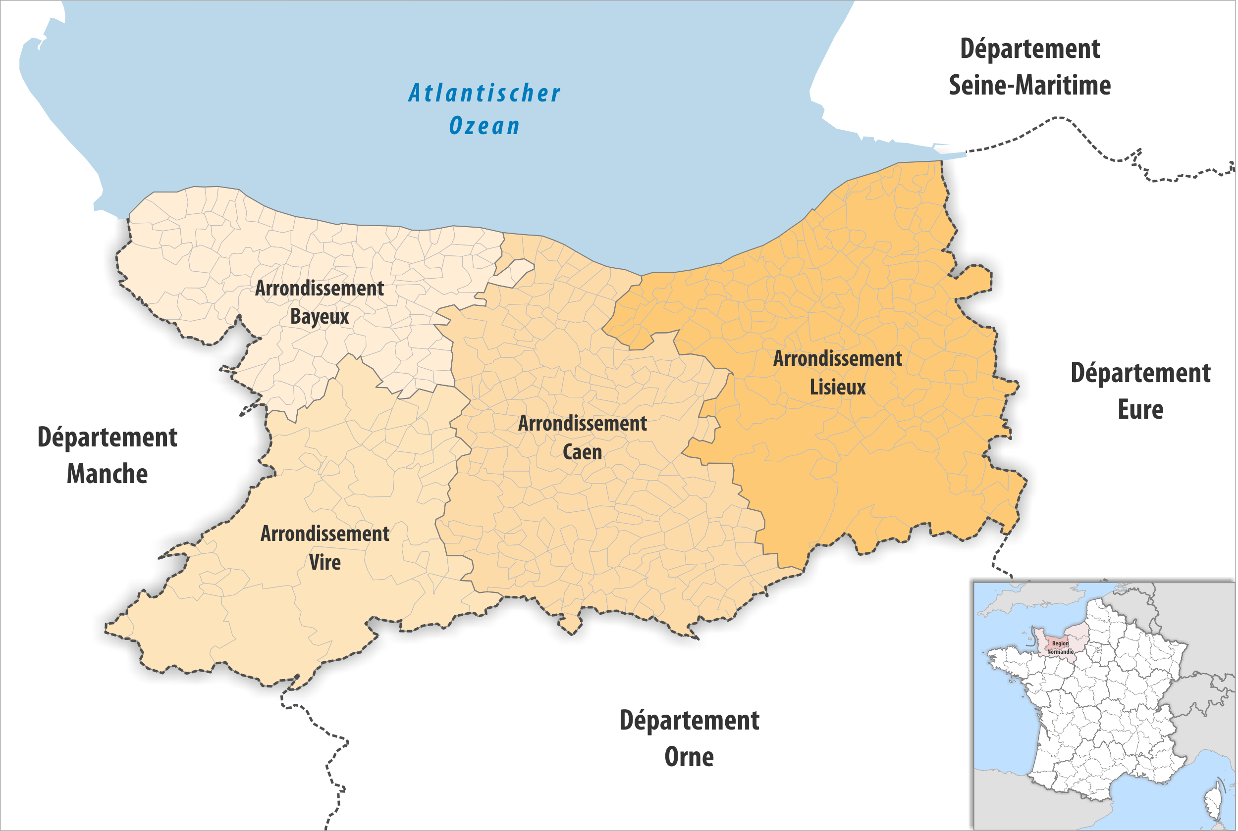 Gemeinden und Arrondissemente im Departement Calvados